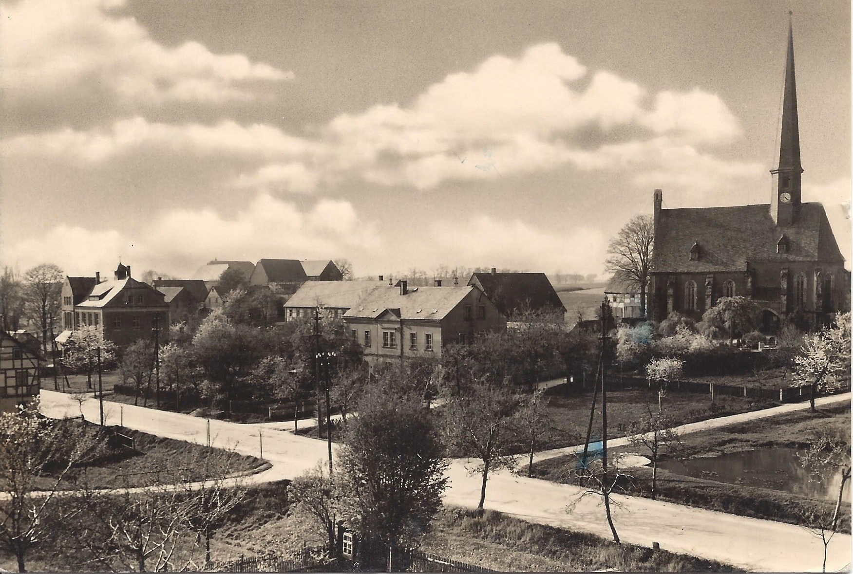 alte Fotografie der Kirche und der alten Schule von Erlau (Sachsen)